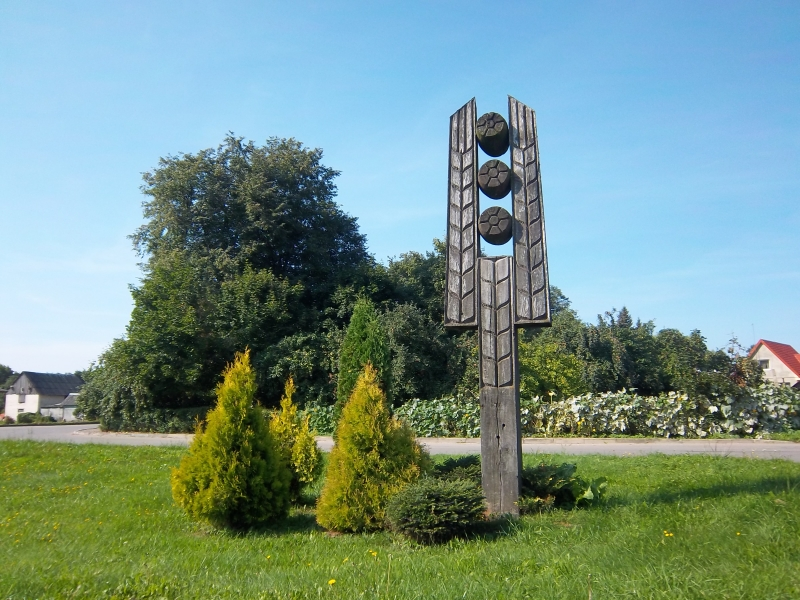 Dovainonių įvažiavimas